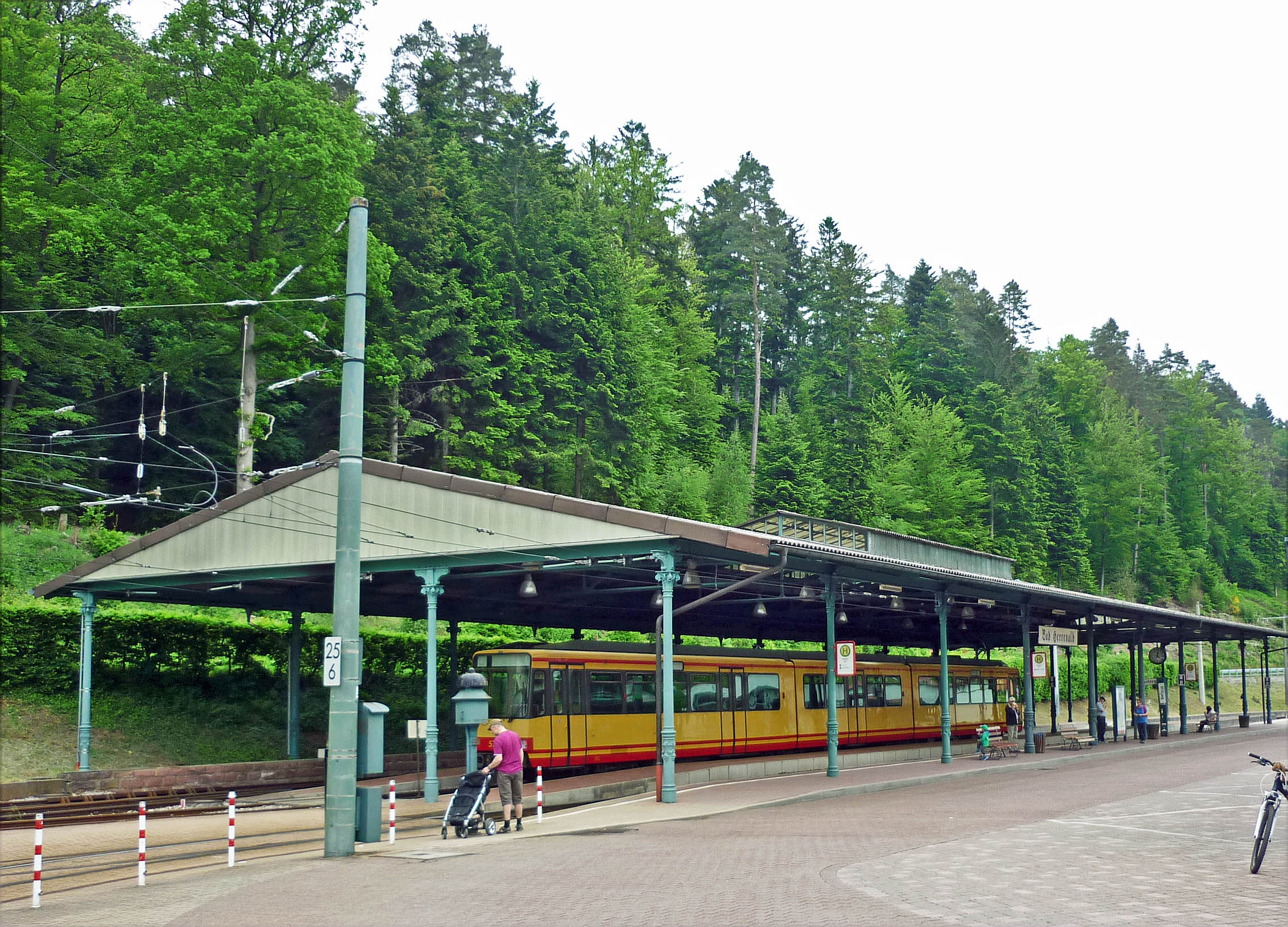 Bahnhof in Bad Herrenalb, Lkr. Calw (Württemberg)